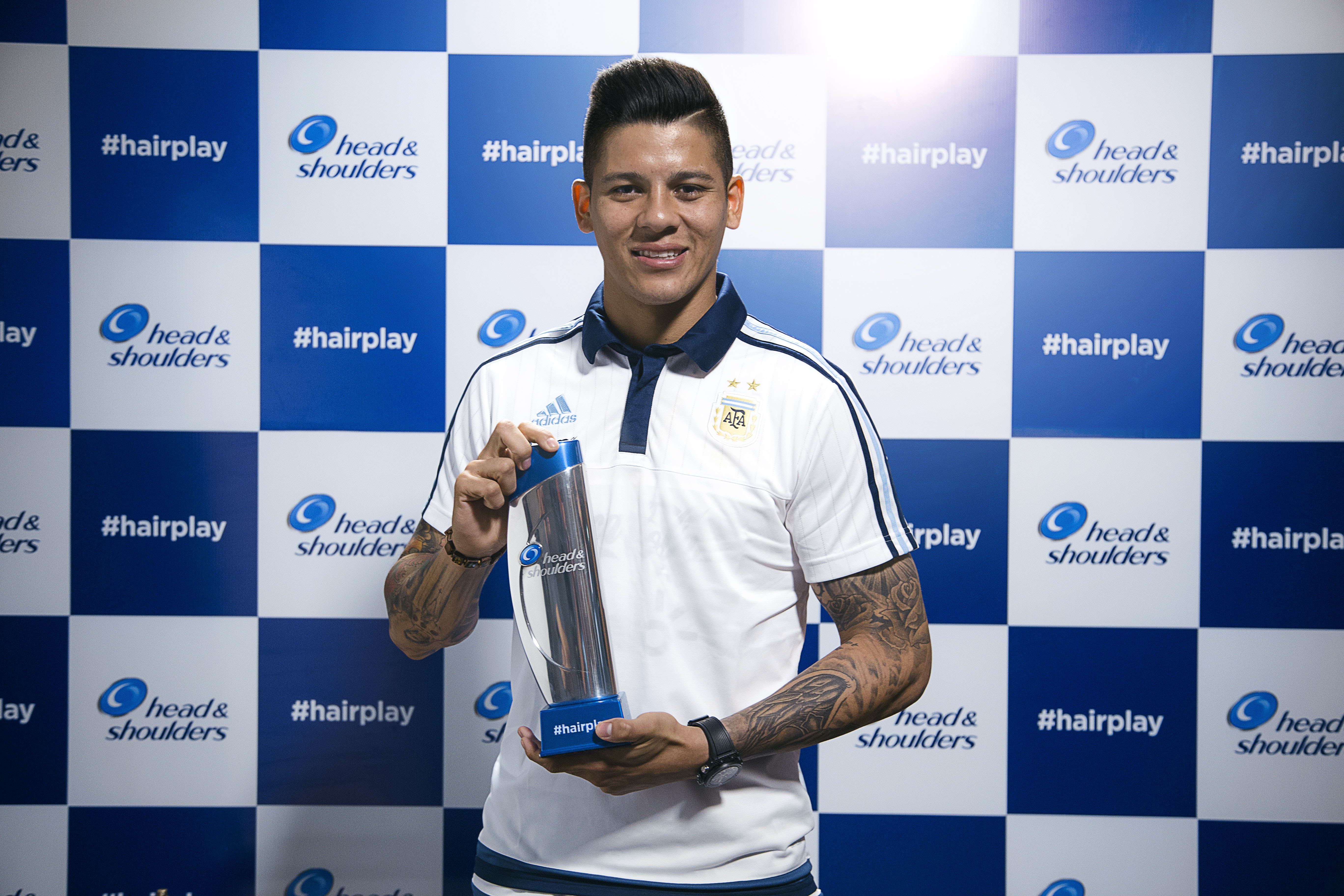 Marcos Rojo sosteniendo el premio Hairplay